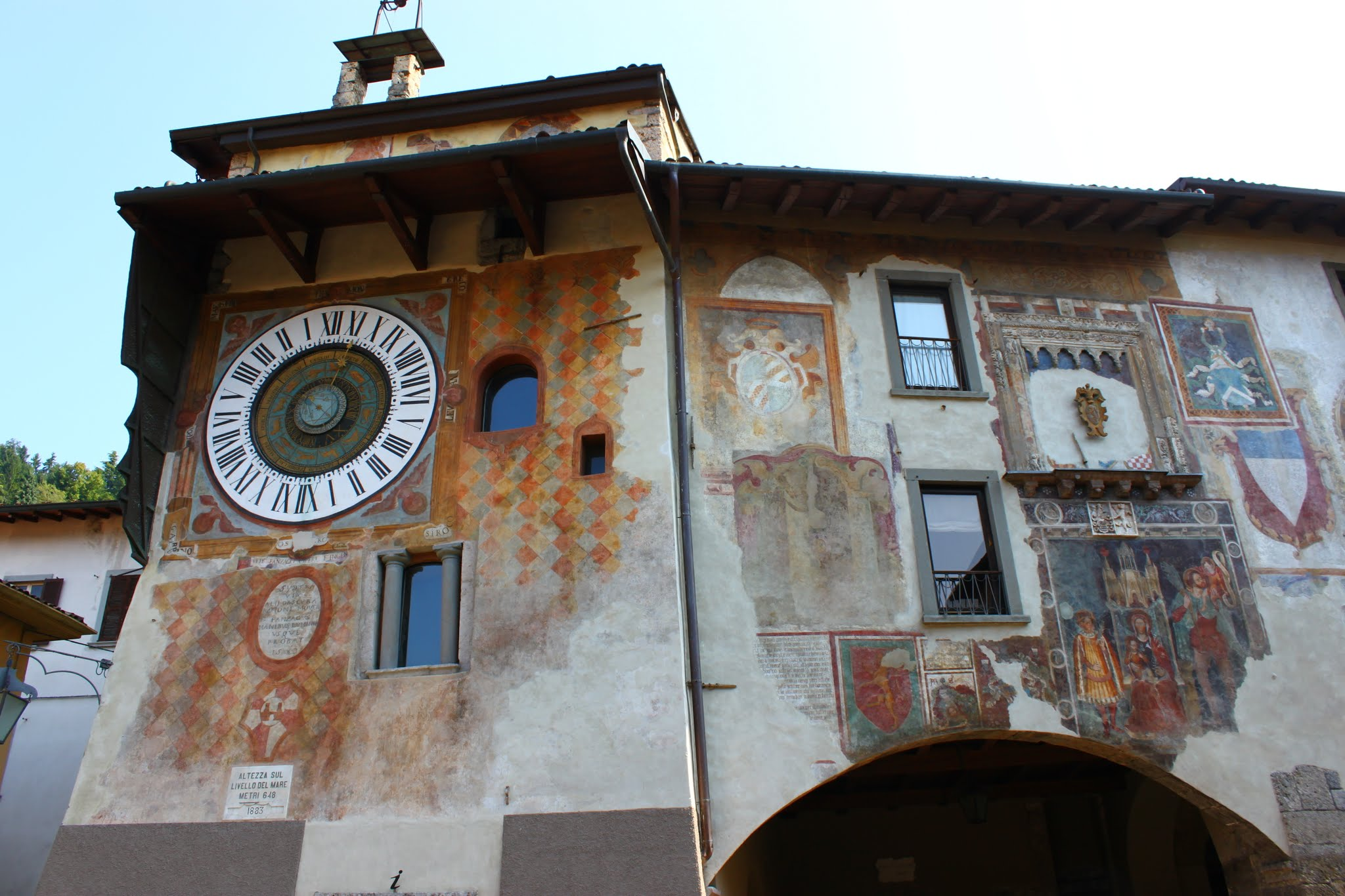 Clusone